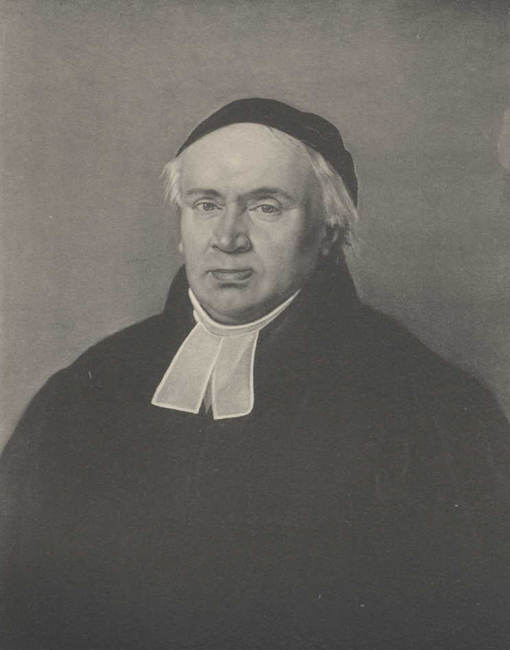 Johann Christian Friedrich Finelius